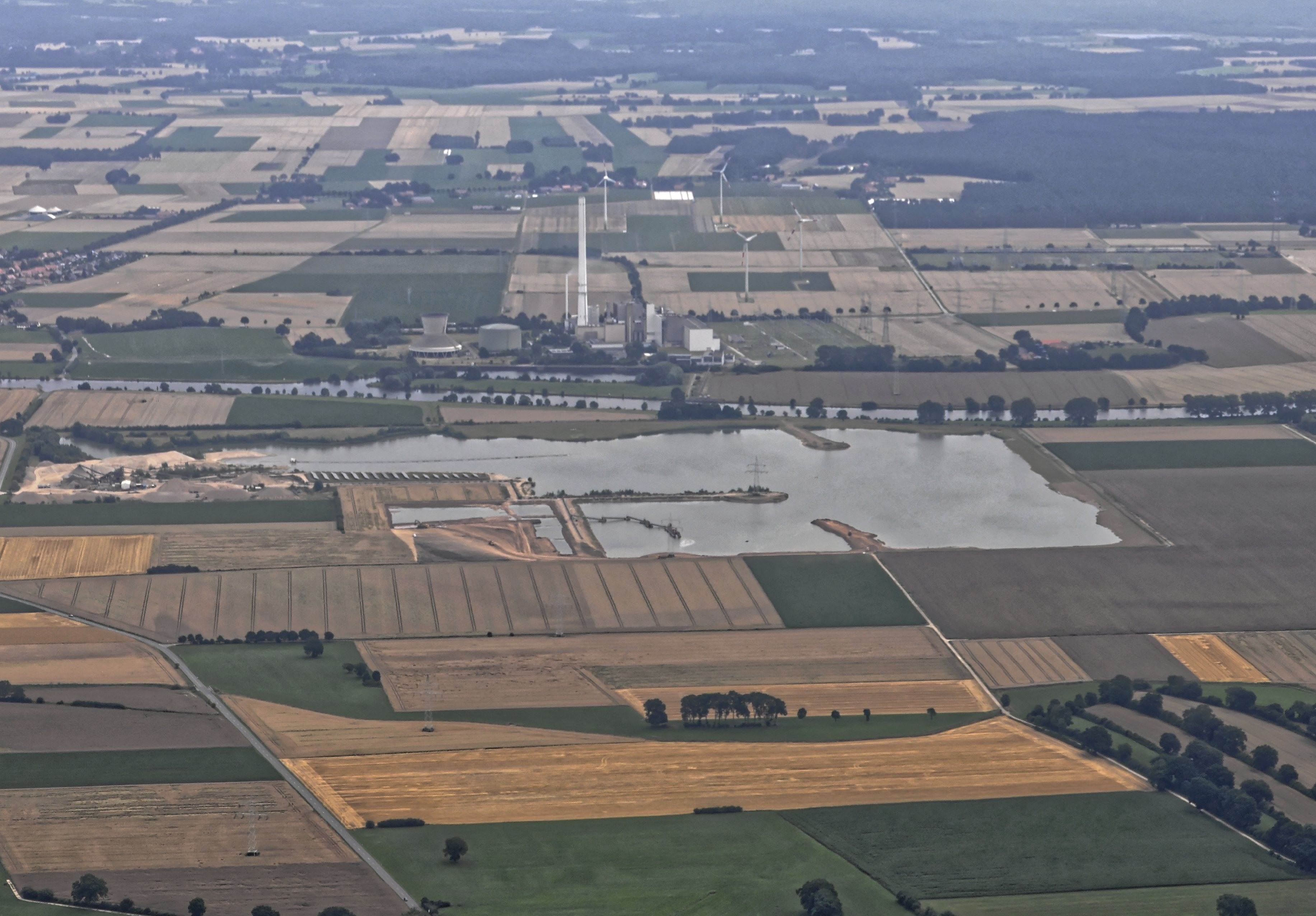 Bilder vom Flug Nordholz-Hammelburg 2015: Kraftwerk Robert Frank an der Weser in Landesbergen